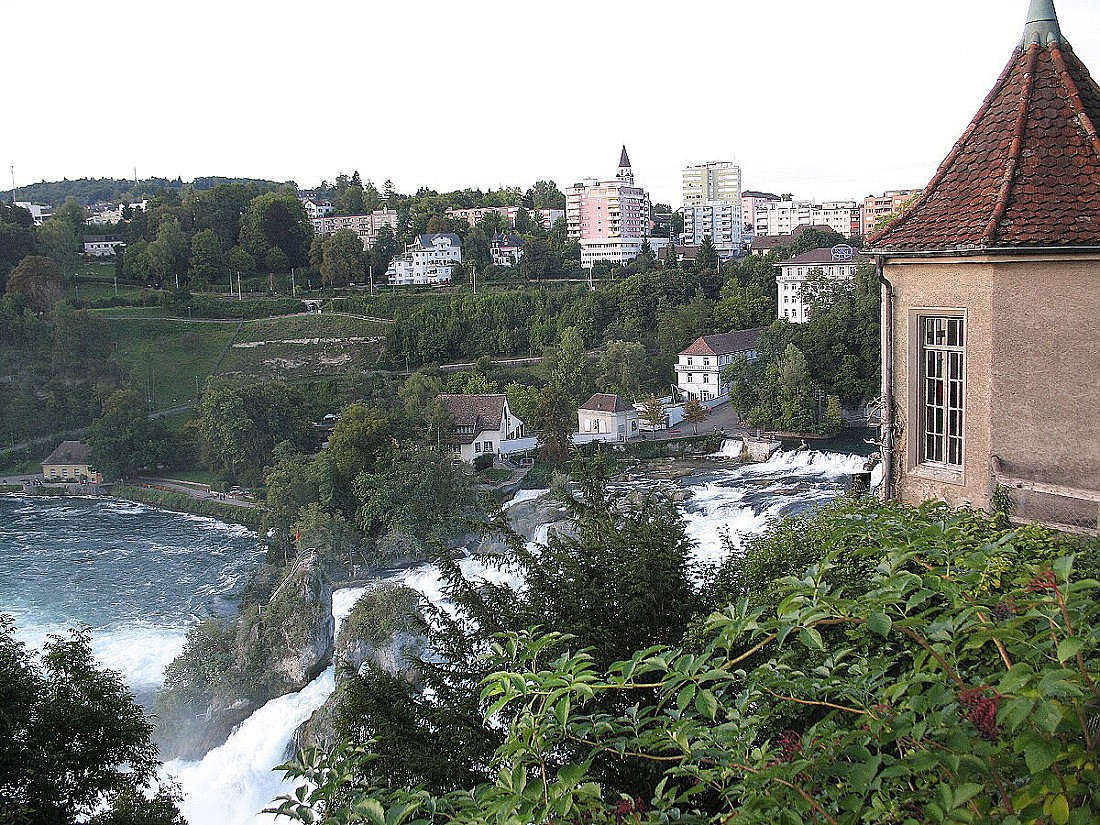 Pohled na Rýnský vodopád a městečko Neuhausen z hradu Laufen